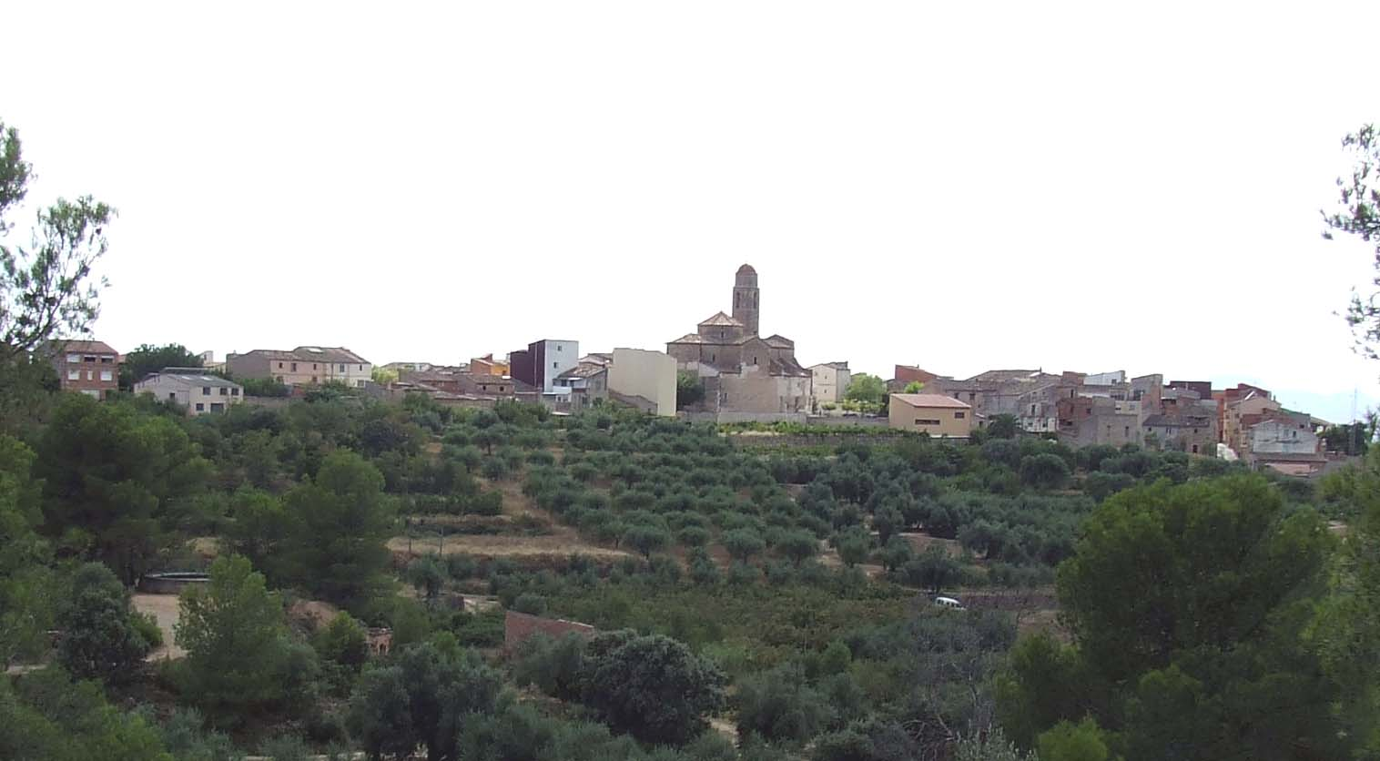 Vista panoràmica dels Guiamets (Priorat)